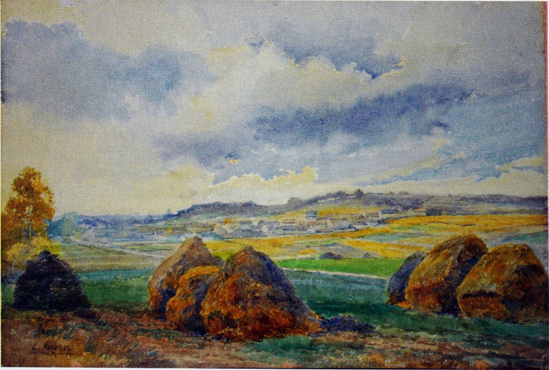 peinture de E. Auger de la collection du musée le Vergeur.